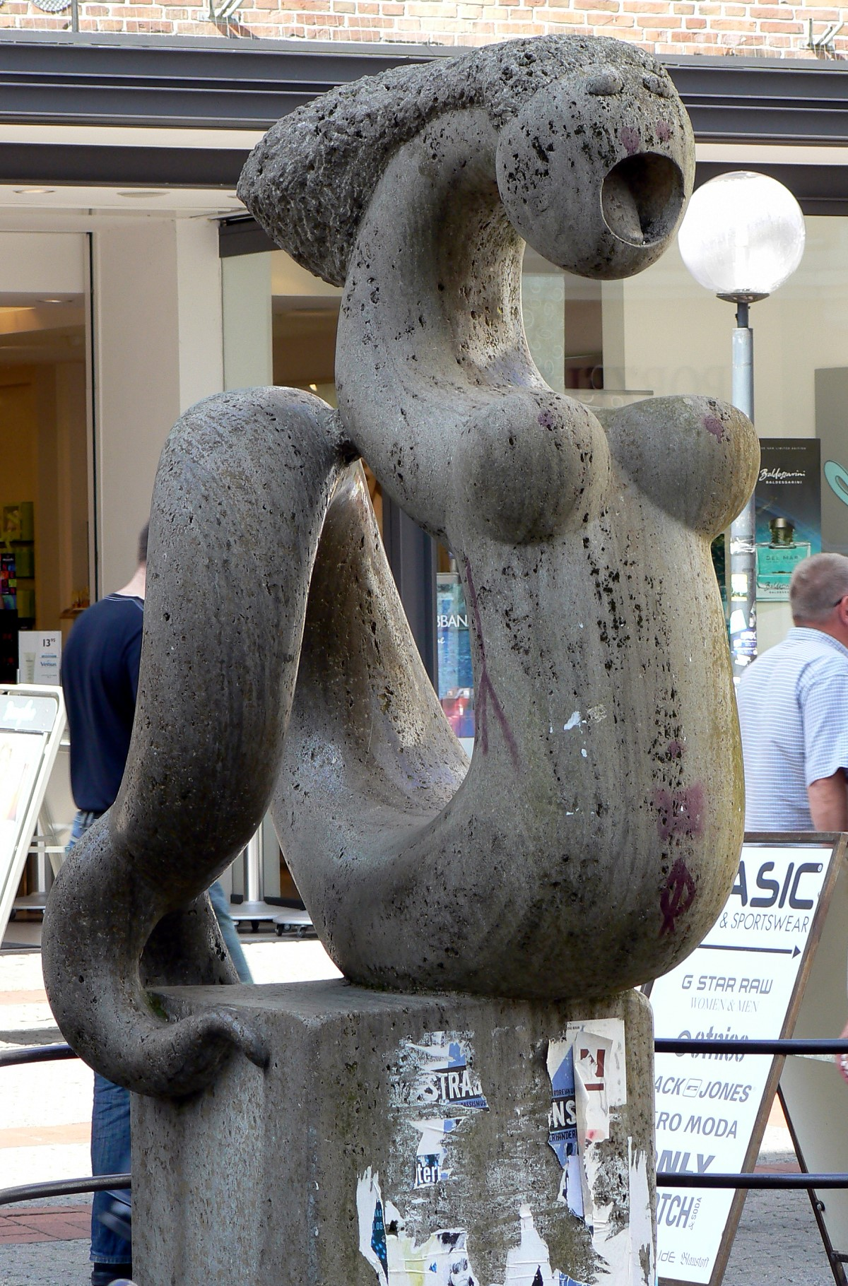 Brunnen-Skulptur Holm-Nixe in Flensburg, Bildhauer: Ulrich Beier (1977).